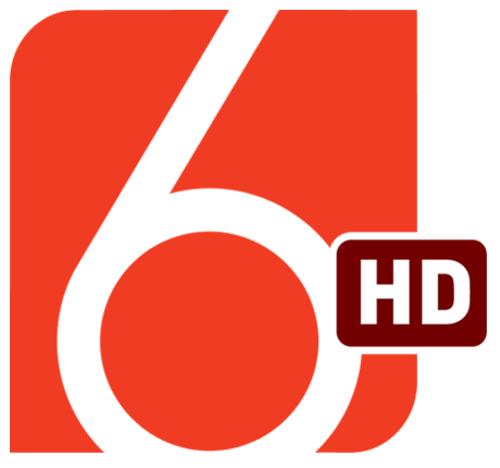 Logo stacji telewizyjnej TV 6 HD.